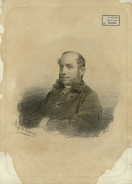 Беларуская (тарашкевіца): Партрэт Баляслава Лапацінскага (1832-1904)